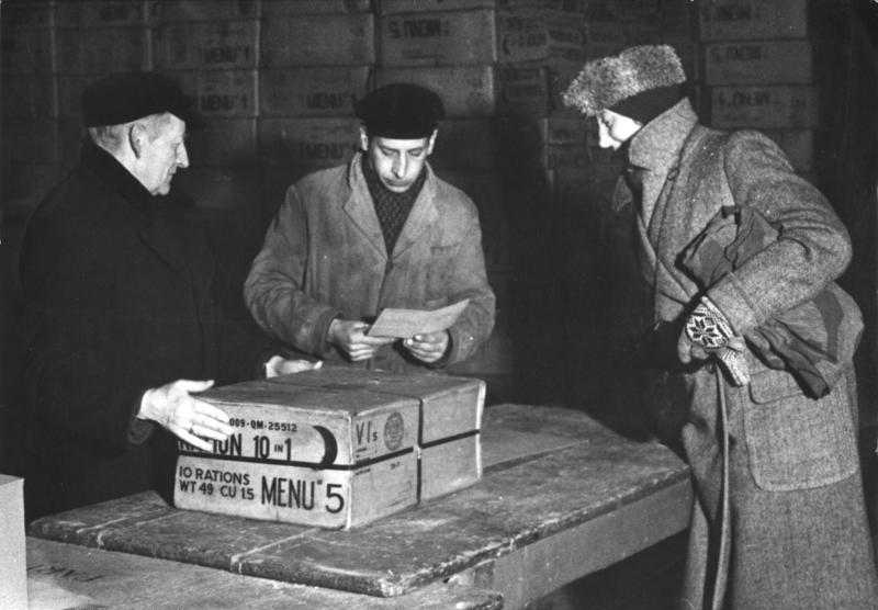 Illus- Erich O. Krueger Berlin: Ausgabe von Care-Paketen; März 1947. In der Ausgabe wird nicht nur der Berechtigungsschein abgenommen, sondern der Ausweis mehrmals geprüft. 471-47